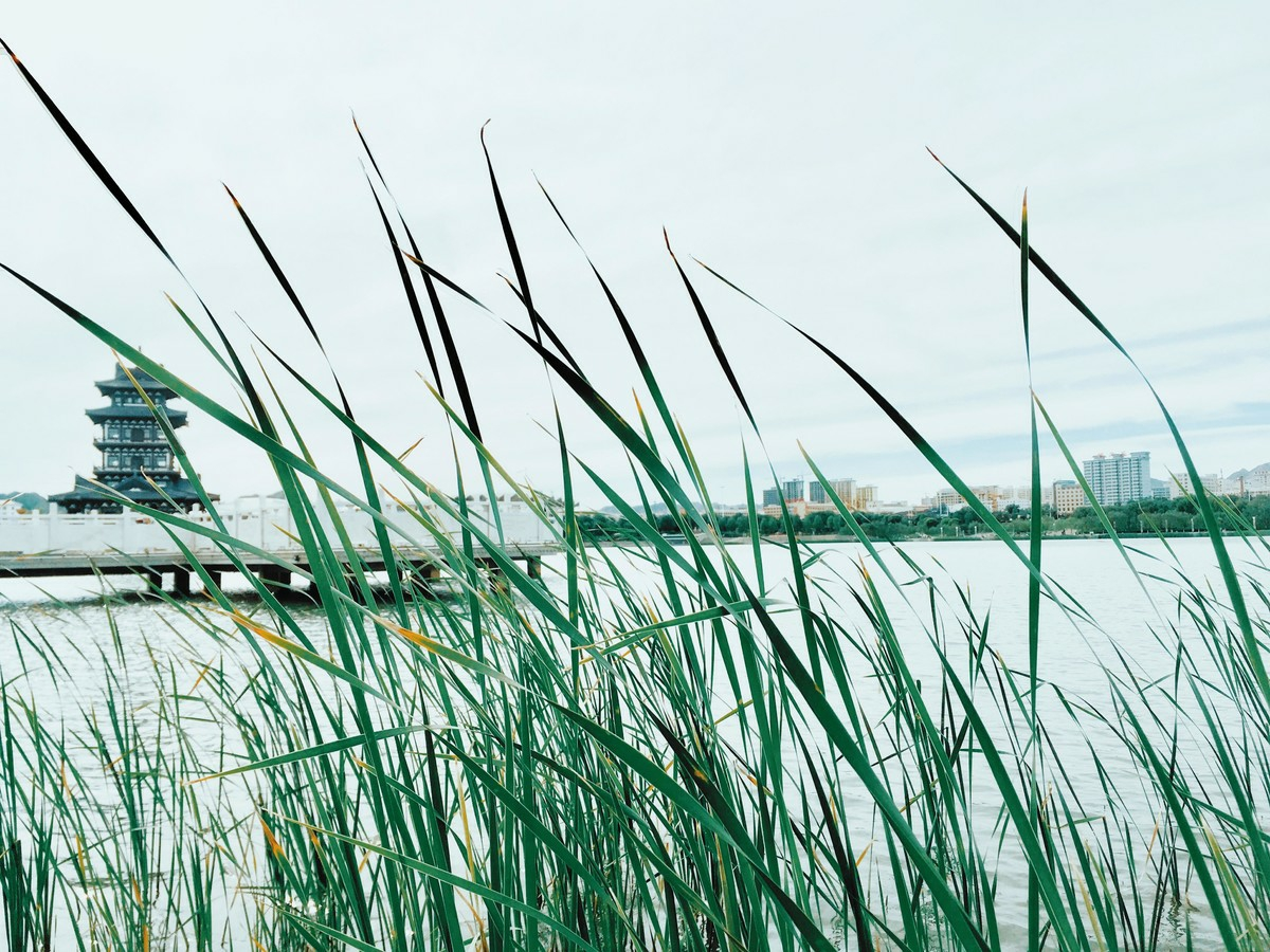 白银市区银凤湖